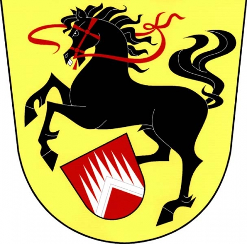 Znak, Rozstání, okres Svitavy